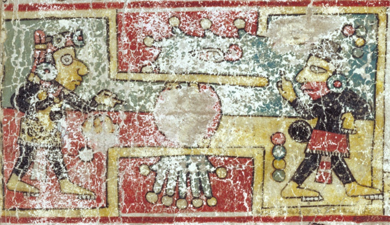 Detalle del folio 2 del códice Colombino mostrando un partido de juego de pelota mesoamericano